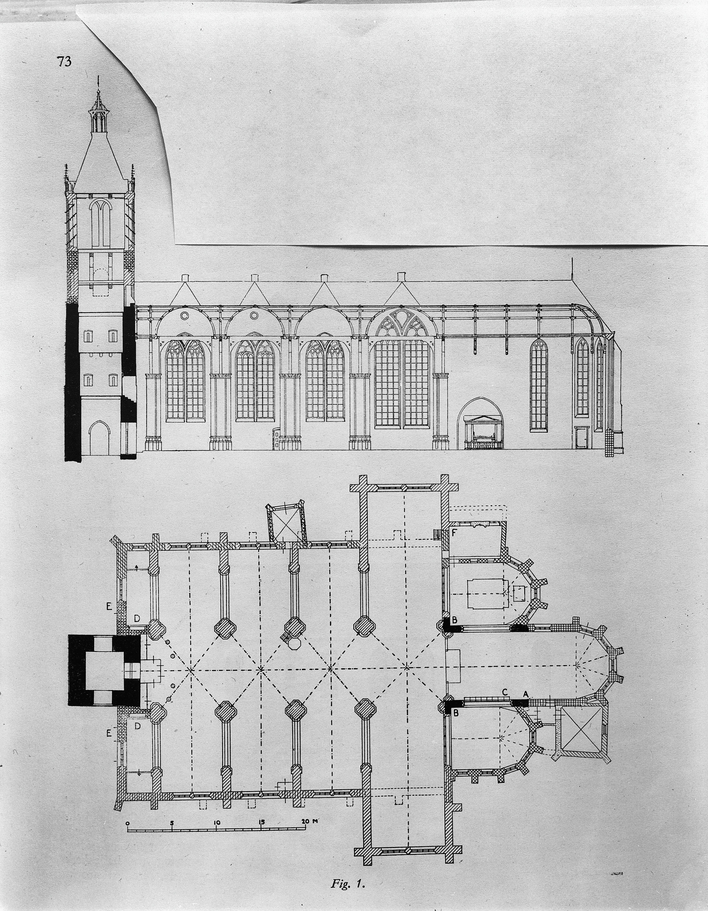 Nederlands Hervormde Kerk: plattegrond en doorsnede